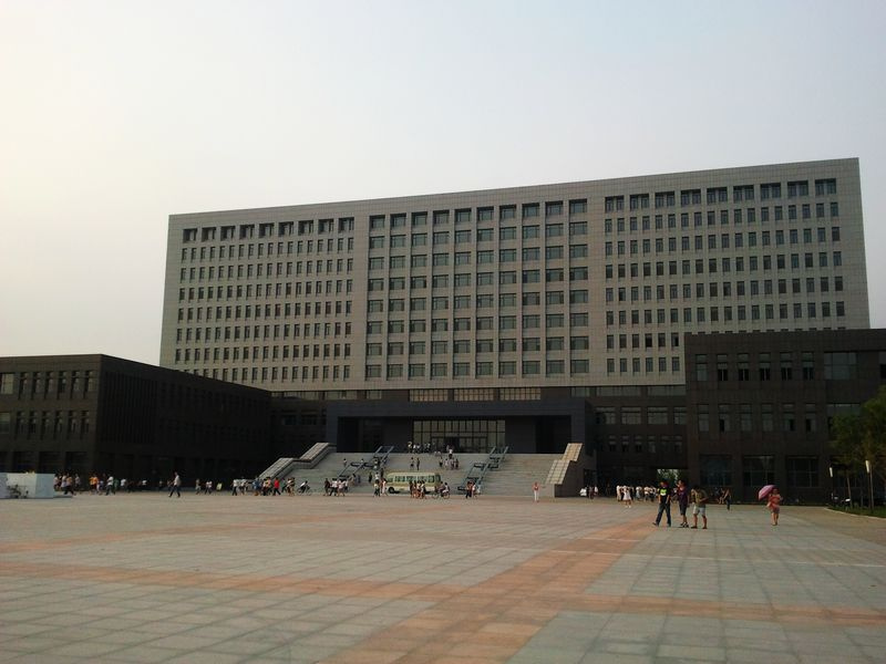 逆光拍摄